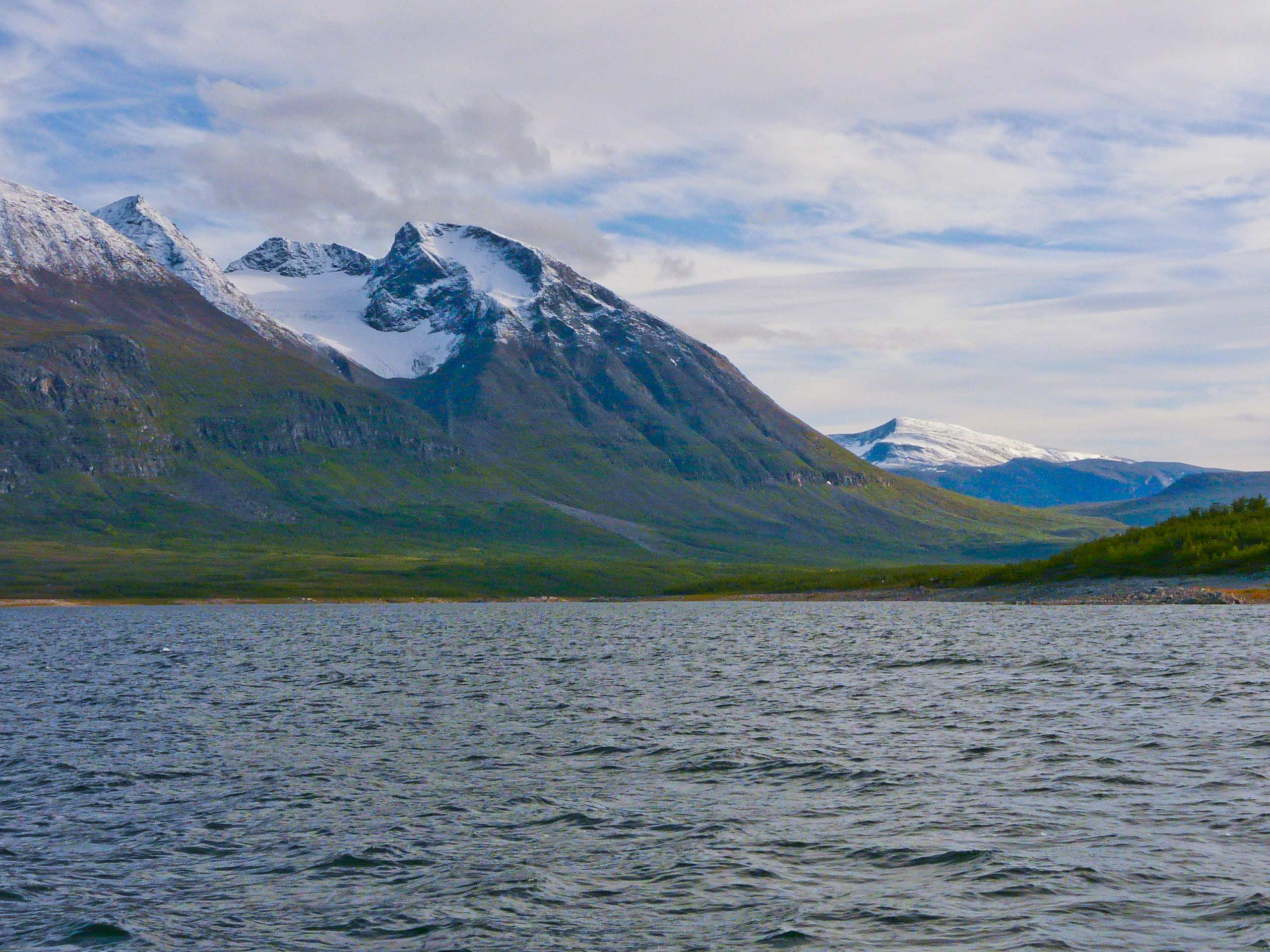 Blick vom Akkajaura auf das Akkamassiv (links) und den Snjuvtjudis (rechts)